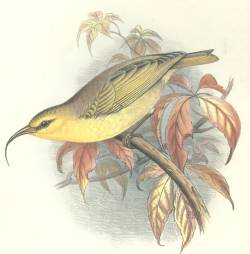 O`AHU NUKUPU'U (Hemignathus lucidus lucidus)